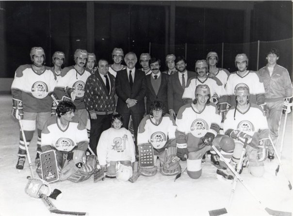 HOCKEY SUR GLACE 1984 N1 UNE EQUIPE DE GUERRIERS